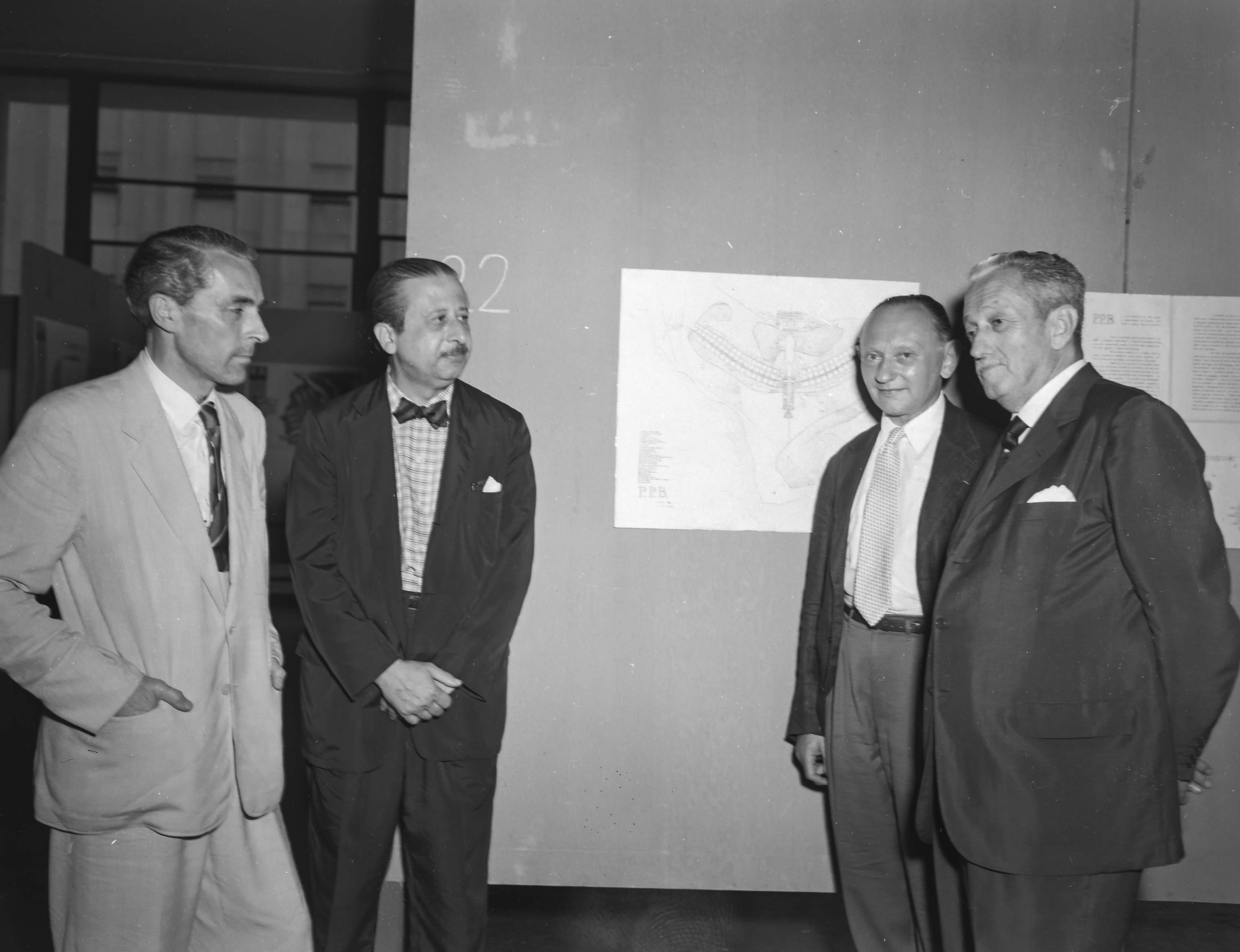 Imagem do Fundo Agência Nacional, do Arquivo Nacional